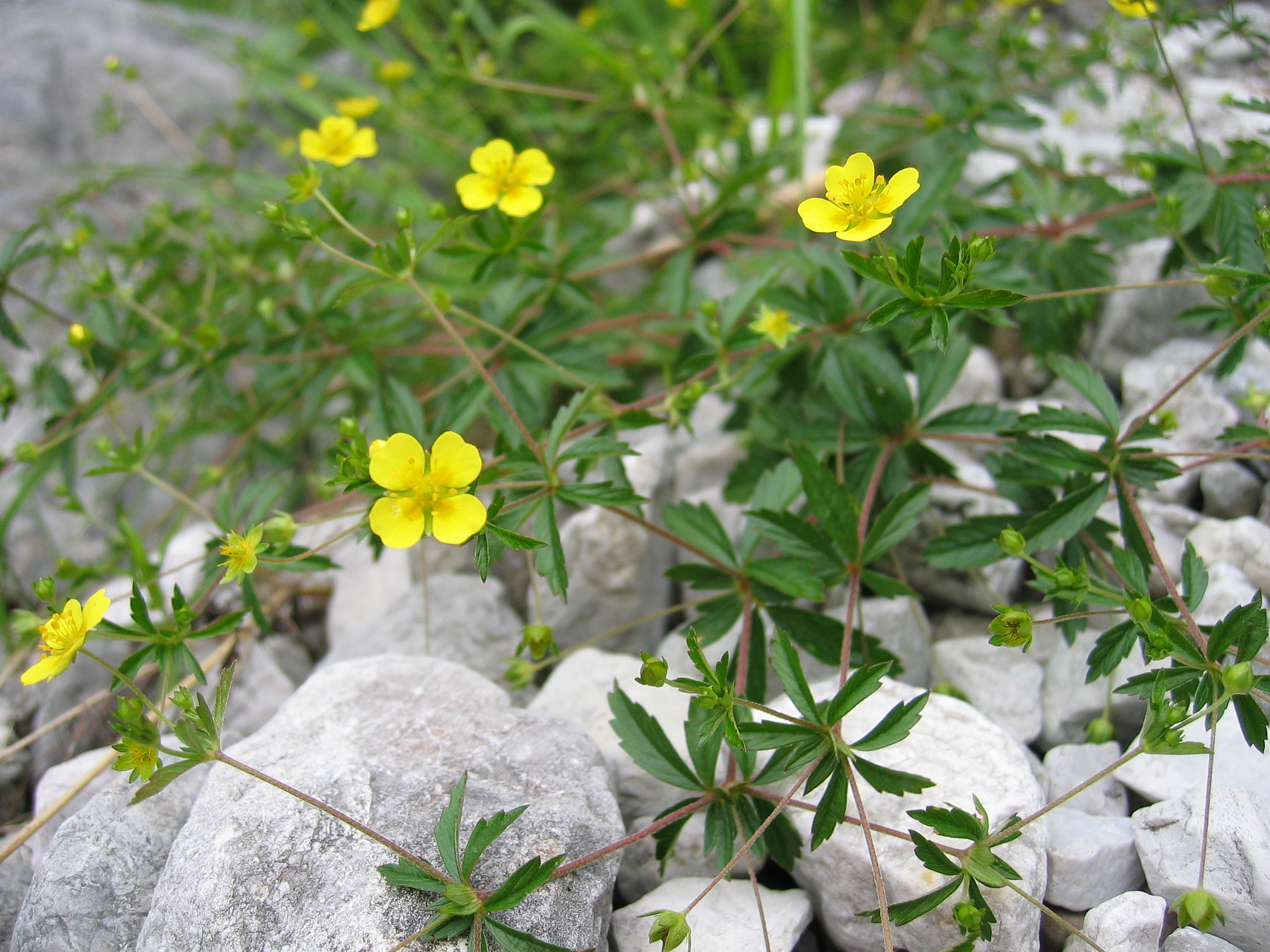 Potentilla erecta In der Röll, Upper Austria, Austria